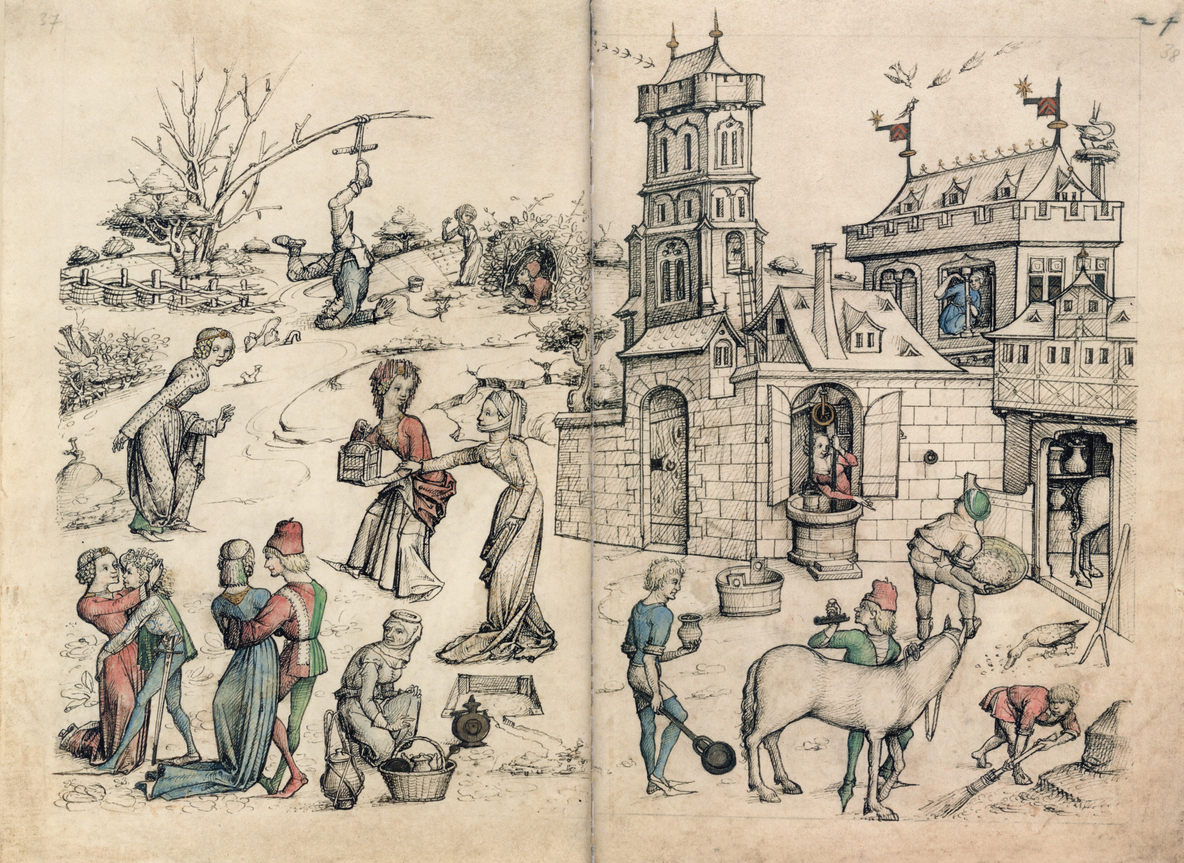 Mittelalterliches Hausbuch von Schloss Wolfegg Doppelseite fol. 23v–24r (Die Niederwildjagd)